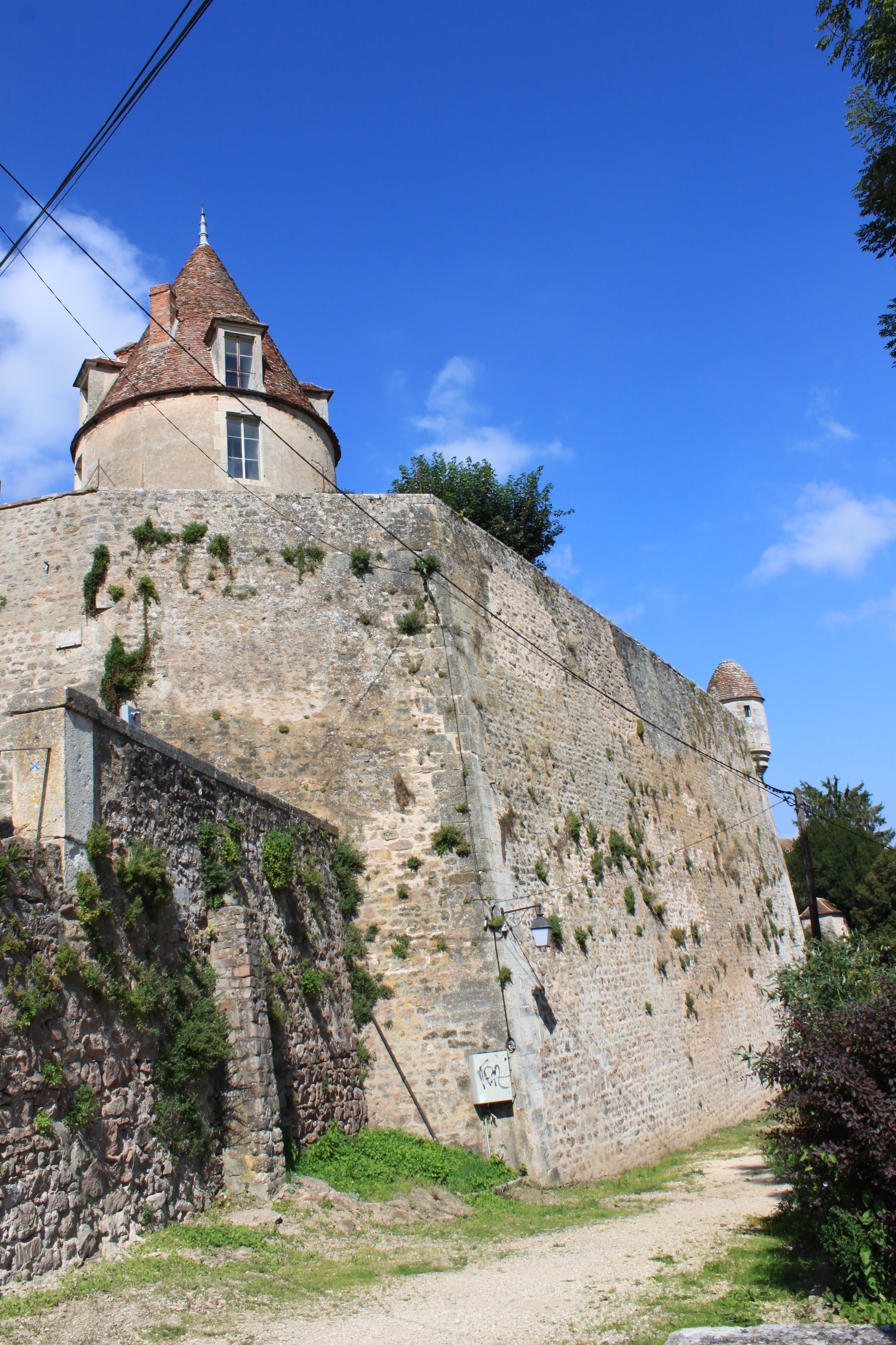 La tour Beurdelaine et son bastion (Avallon, Yonne, Bourgogne-Franche-Comté, France). Cette tour a été construite en 1404 sur ordre du duc de Bourgogne Jean sans Peur.